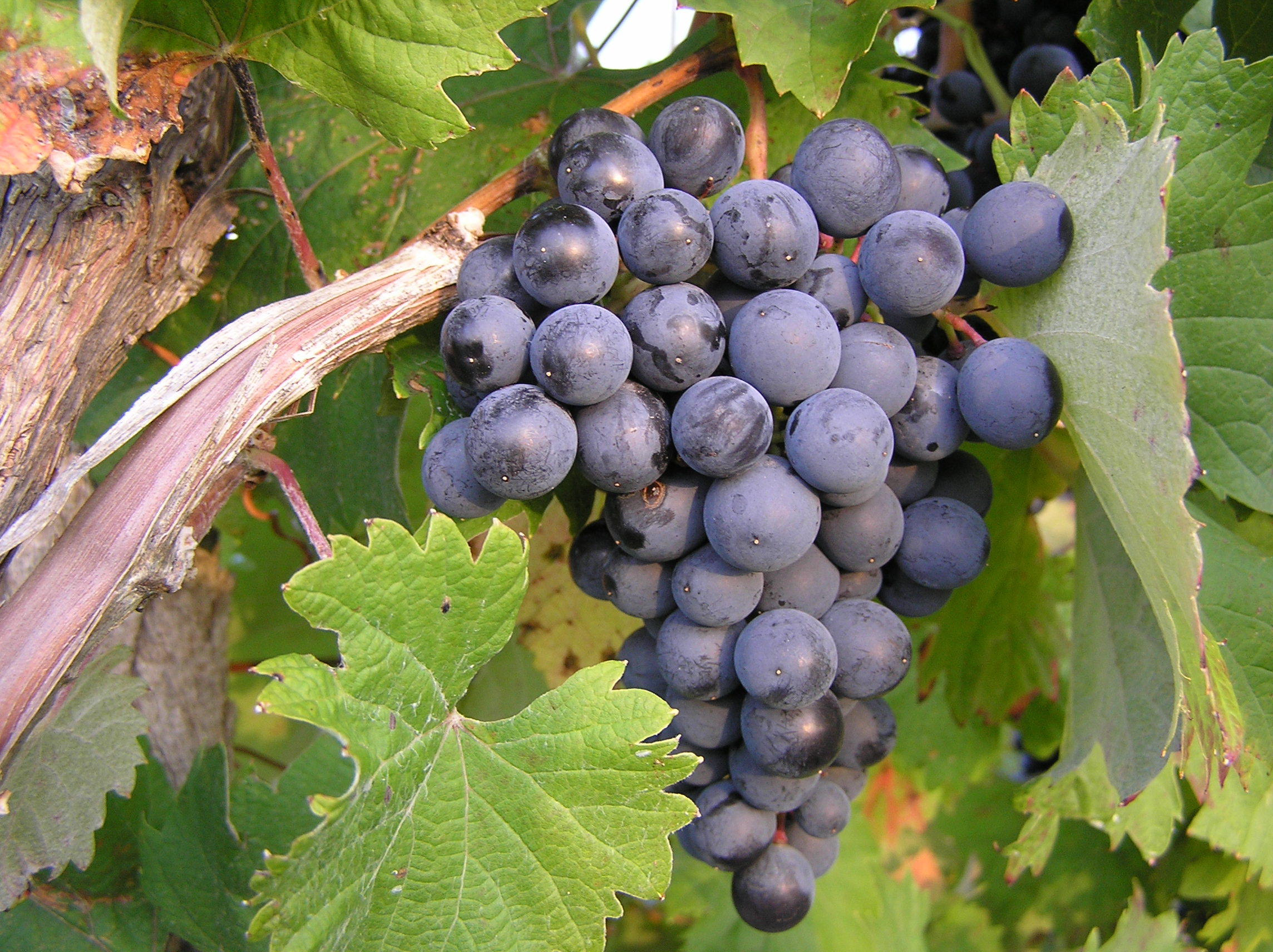 Grozd trte refošk, iz katerega bo kmalu nastal teran.